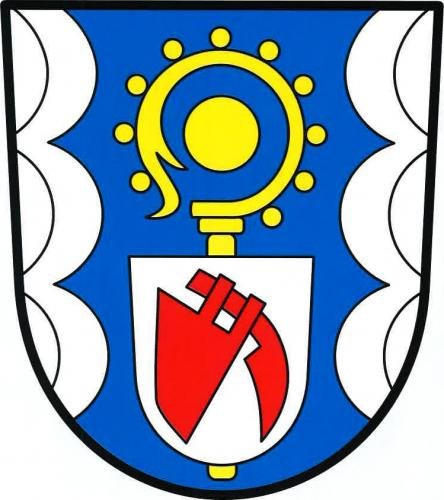 Znak obce Hněvotín